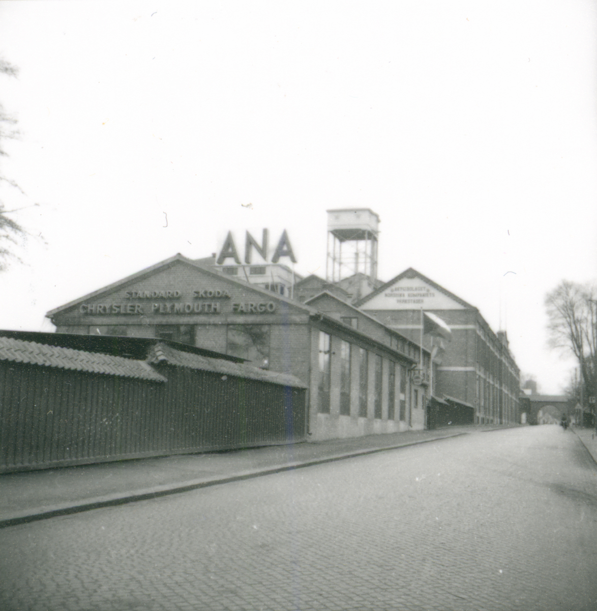 Nyköpings Automobilfabrik Folkungavägen 1 Kompaniet Öster Nyköping Alla helgona Rönö Nyköping Södermanland Södermanland Sverige.